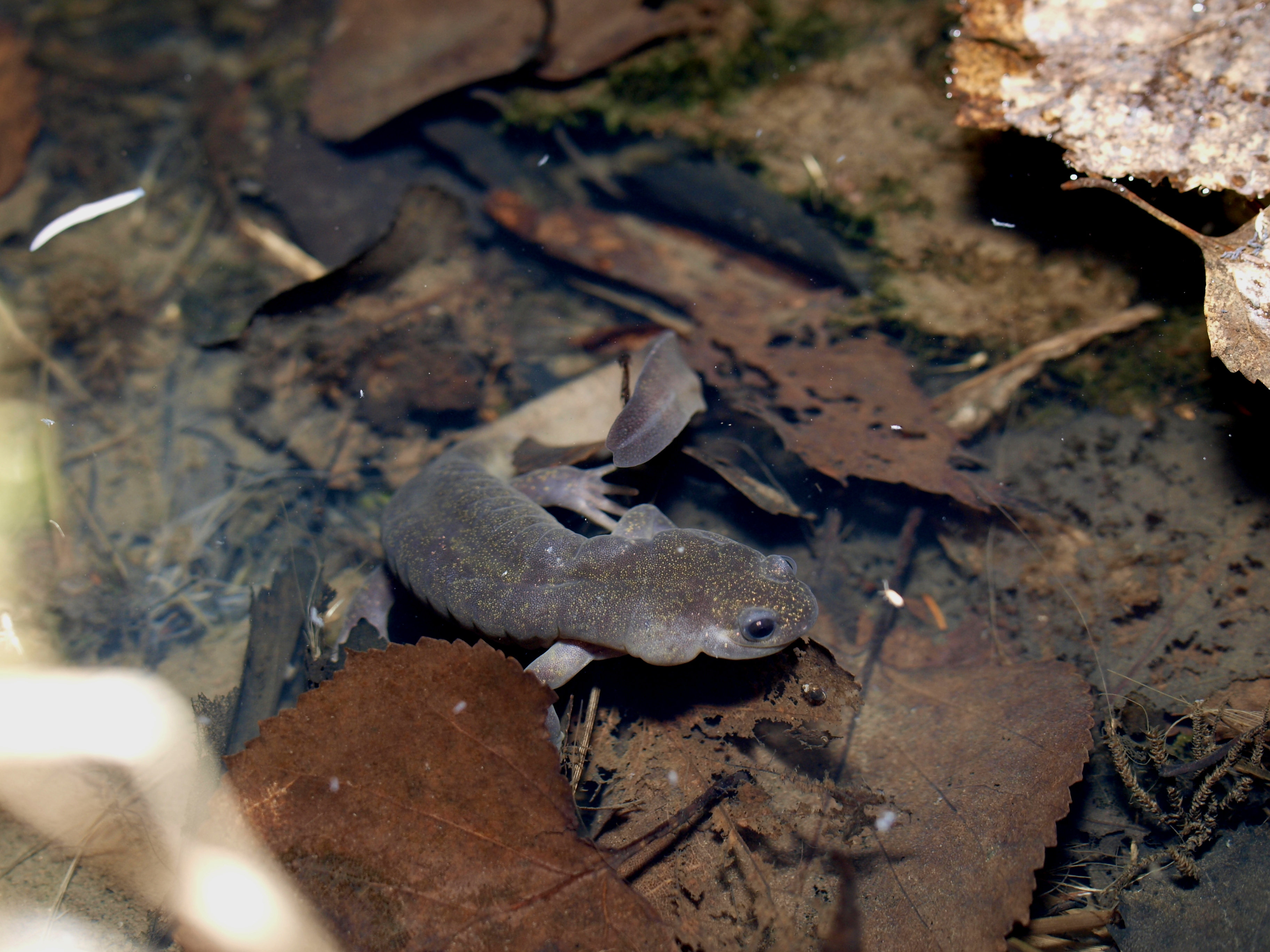 Ezo salamander エゾサンショウウオ Hynobius retardatus . 雪解けの水で産卵。